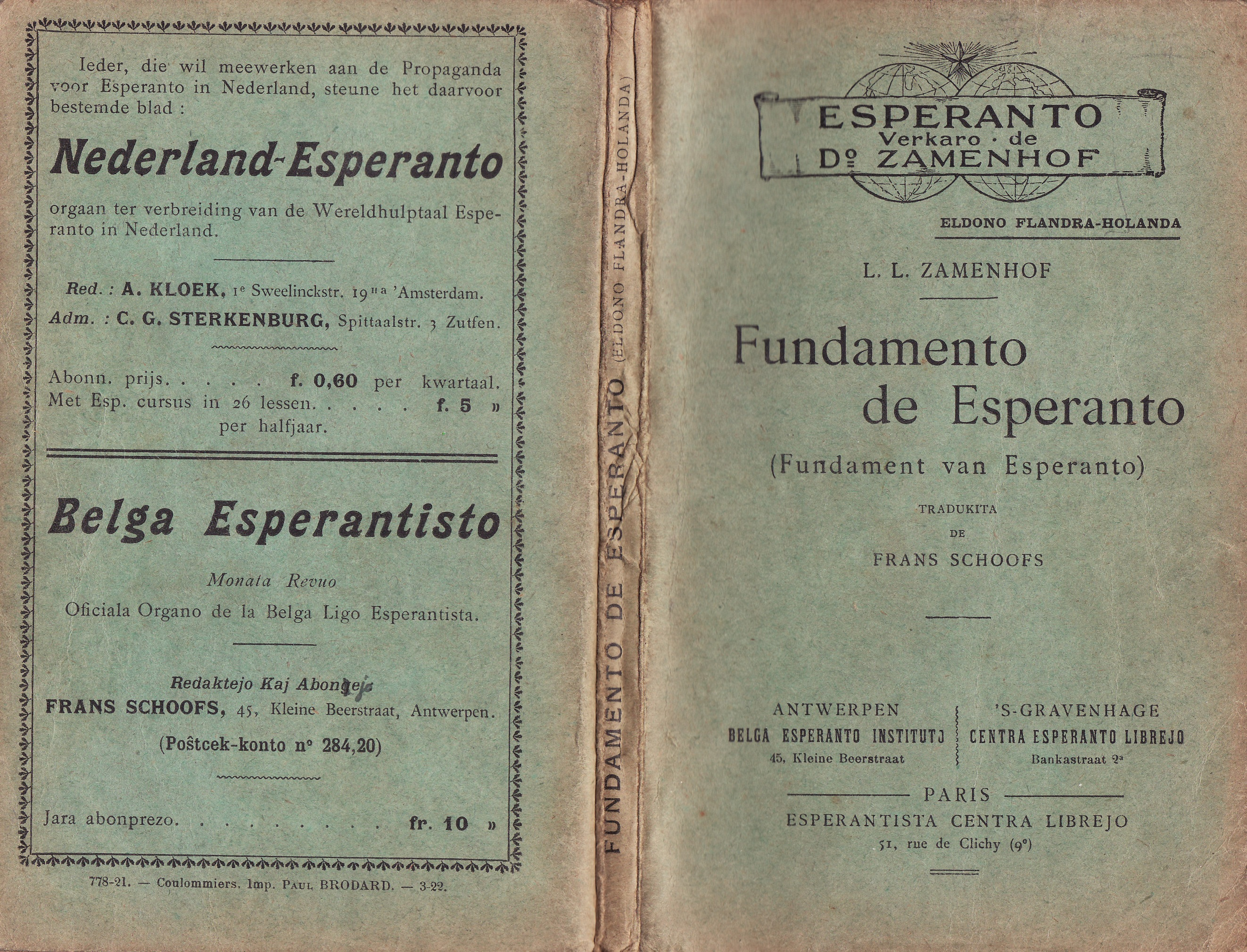 1922 Fundamento de Esperanto - Eldono nederlanda